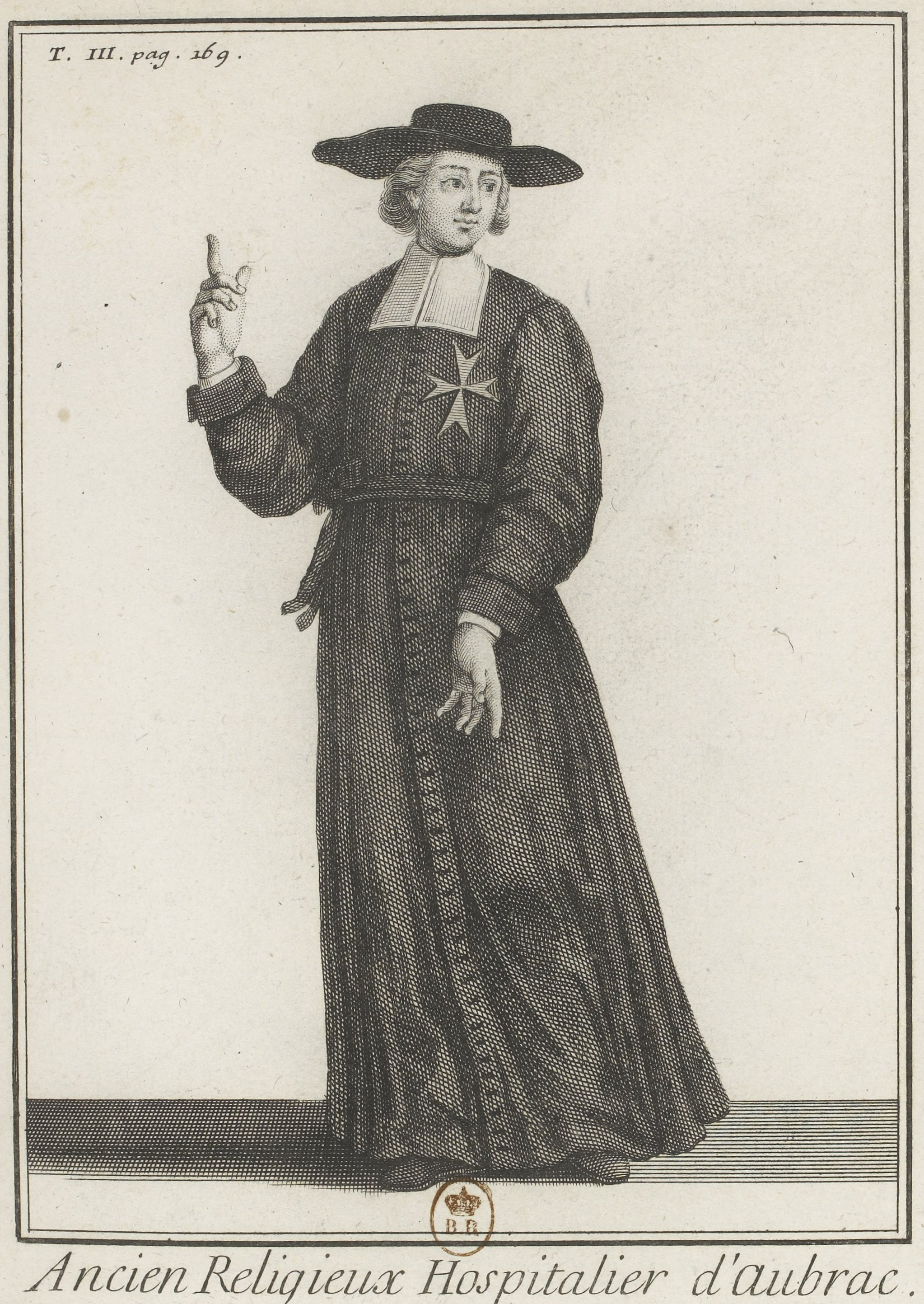 Ancien religieux hospitalier d'Aubrac dans Figures pour l'Histoire des ordres monastiques, religieux et militaires